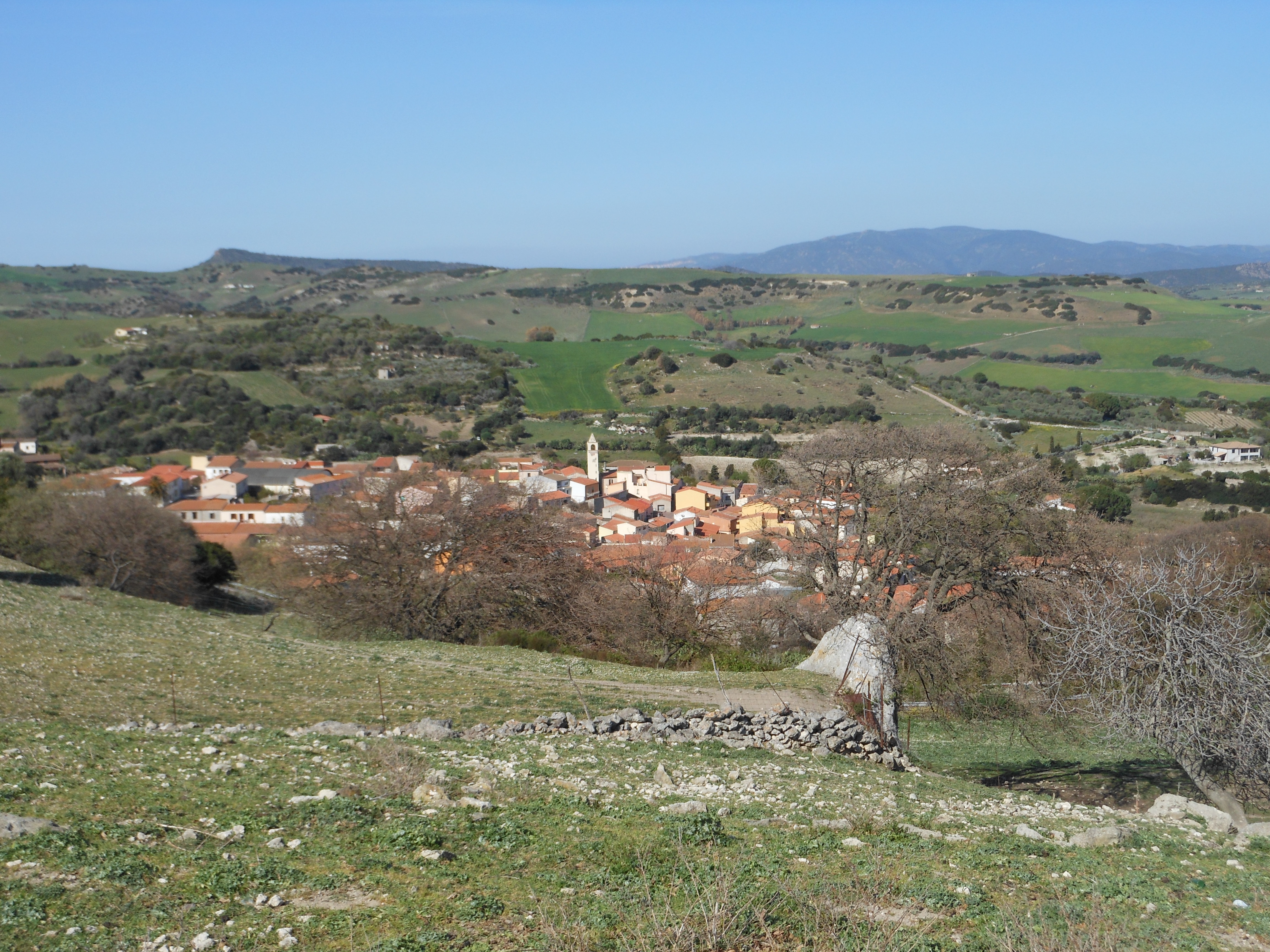 Bulzi - panorama